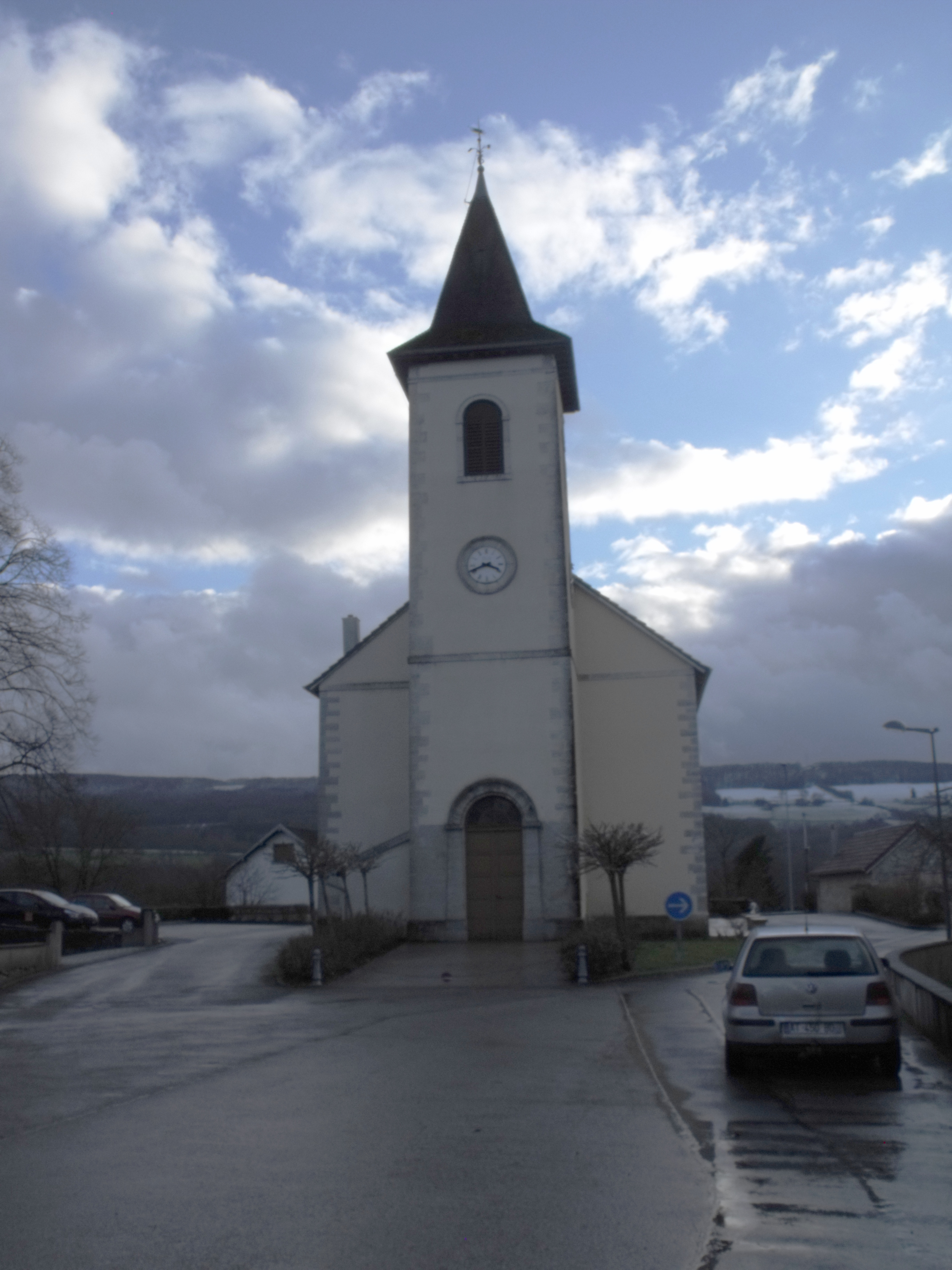 Eglise Saint-Ferréol et Saint-Fergeux à Autechaux-Roide, Doubs, France